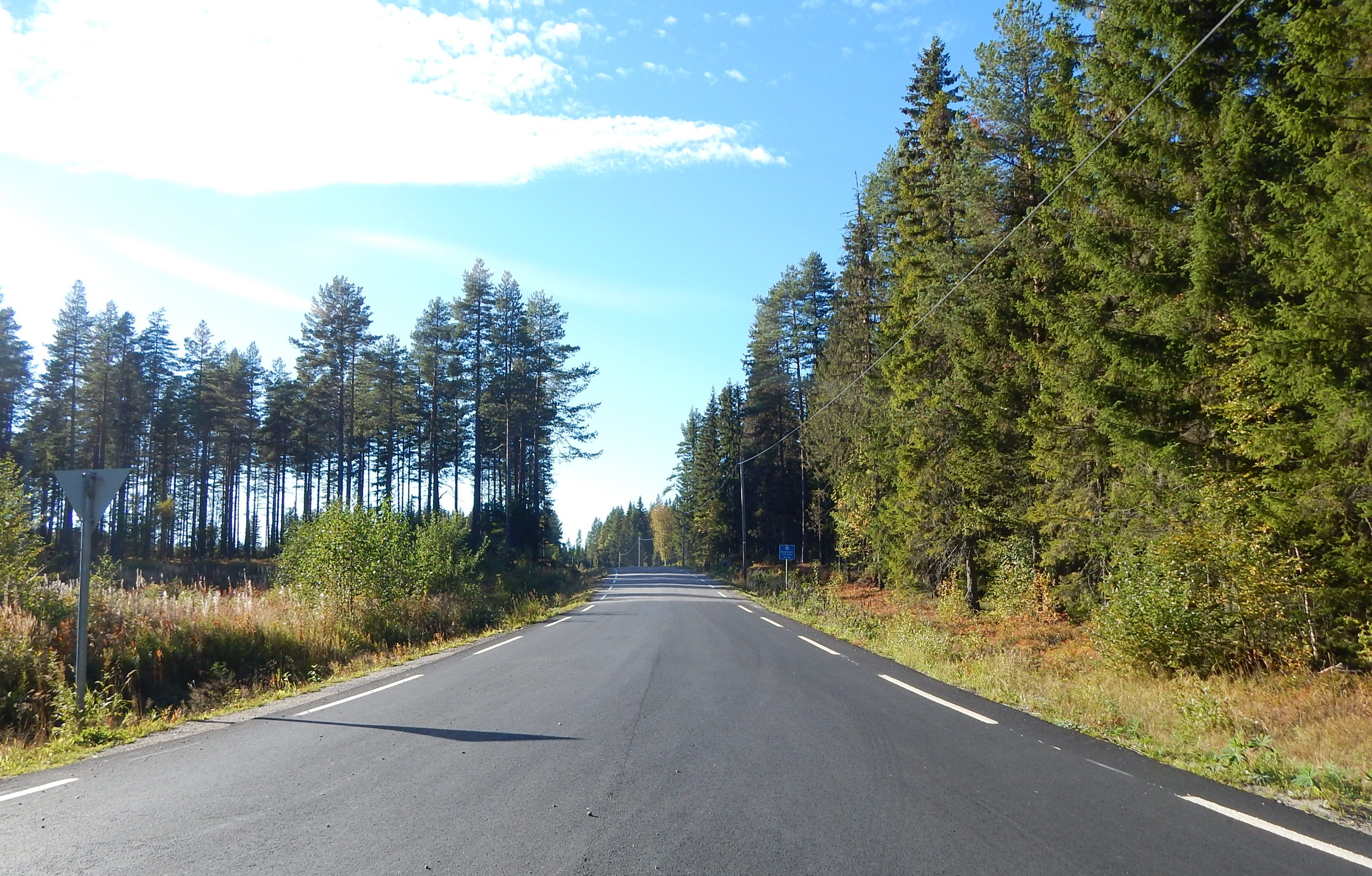 Skramstadsæterveien (fylkesvei 602)